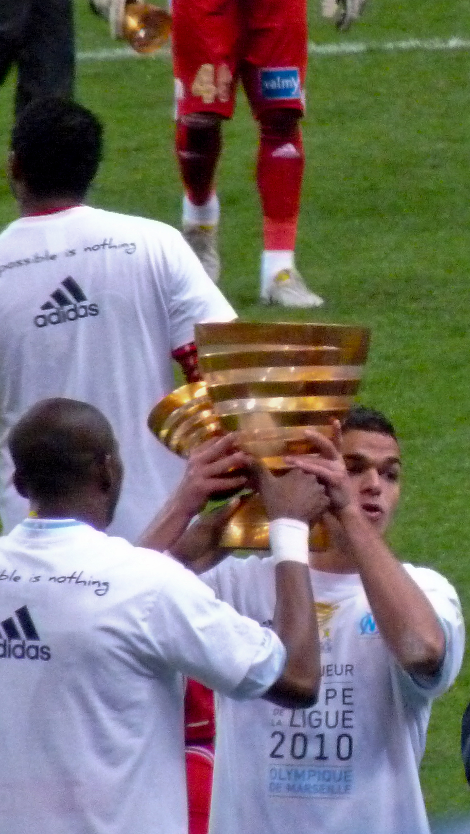 Finale de la coupe de la ligue - OM vs Bordeaux 3-1 - Stade de France - 27 mars 2010